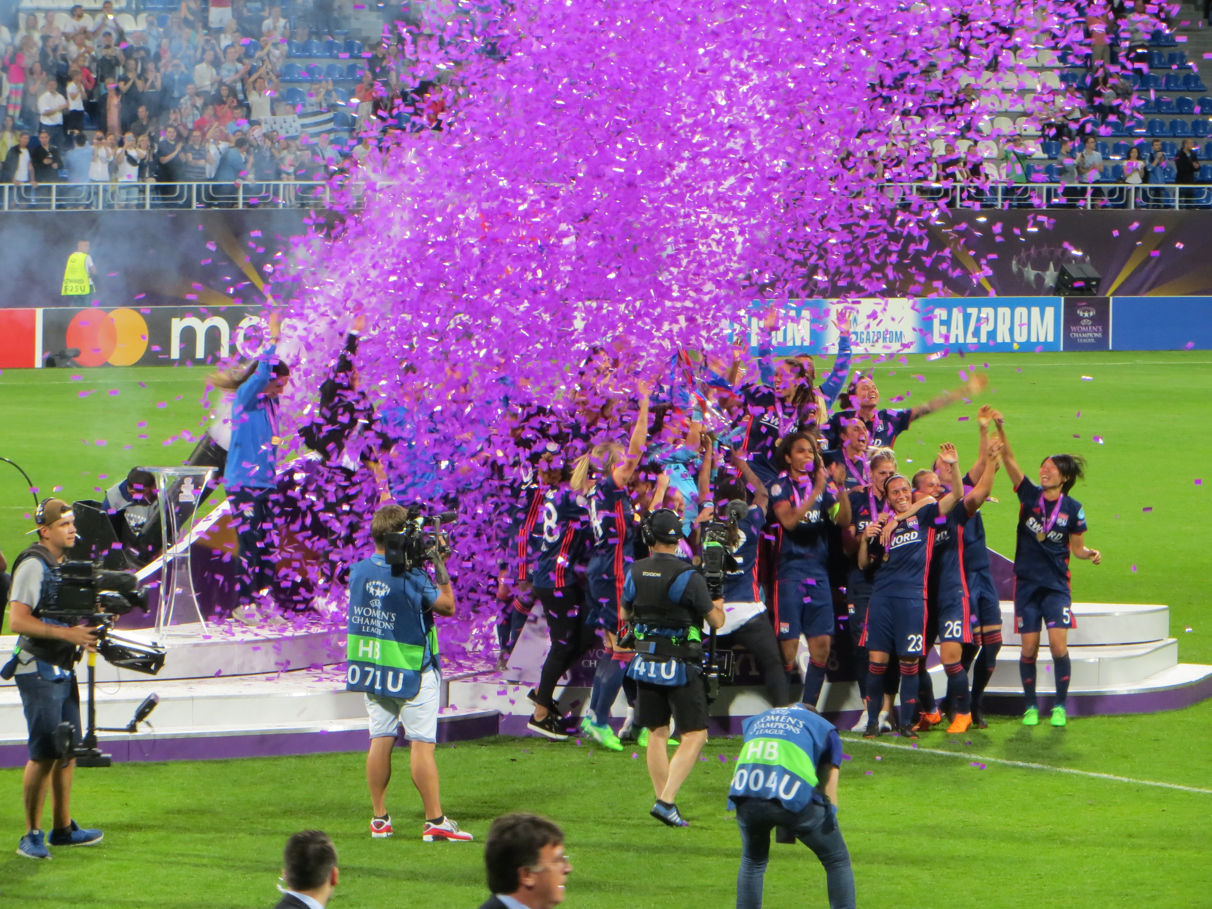 Фінал жіночої Ліги чемпіонів 2018 у Києві. Вольфсбург - Ліон 1:4